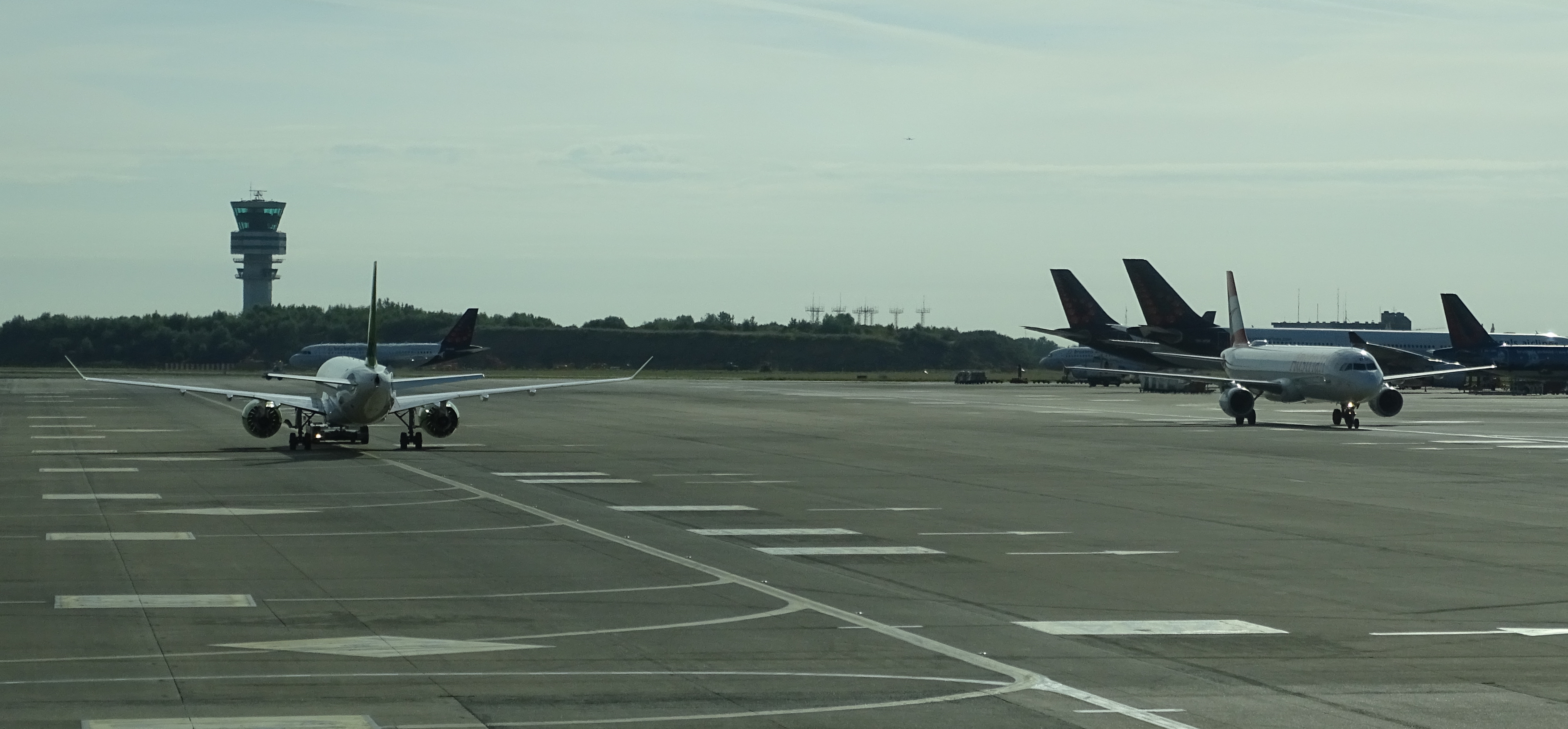 Het vliegplateau (apron) op Brussels Airport.